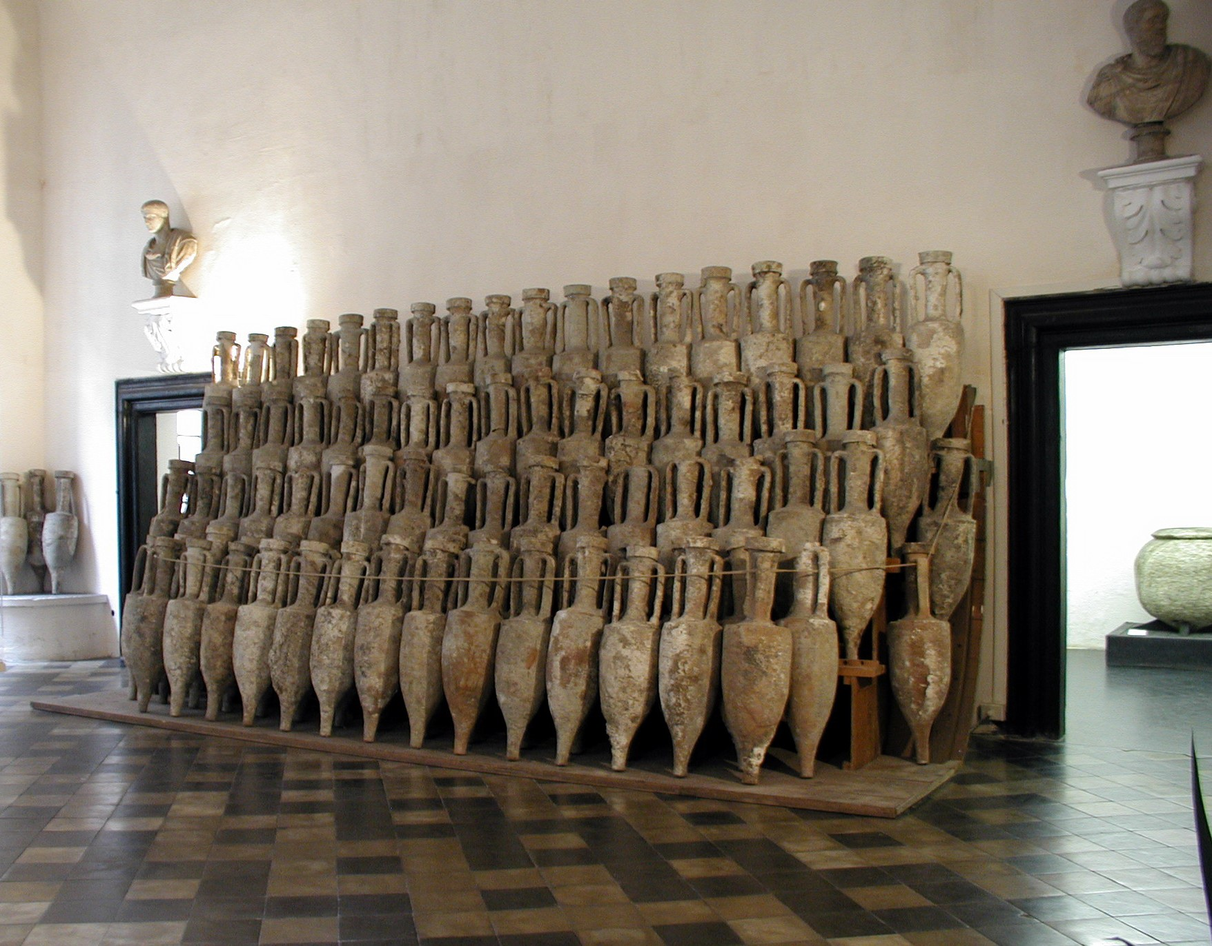 le anfore del museo navale romano